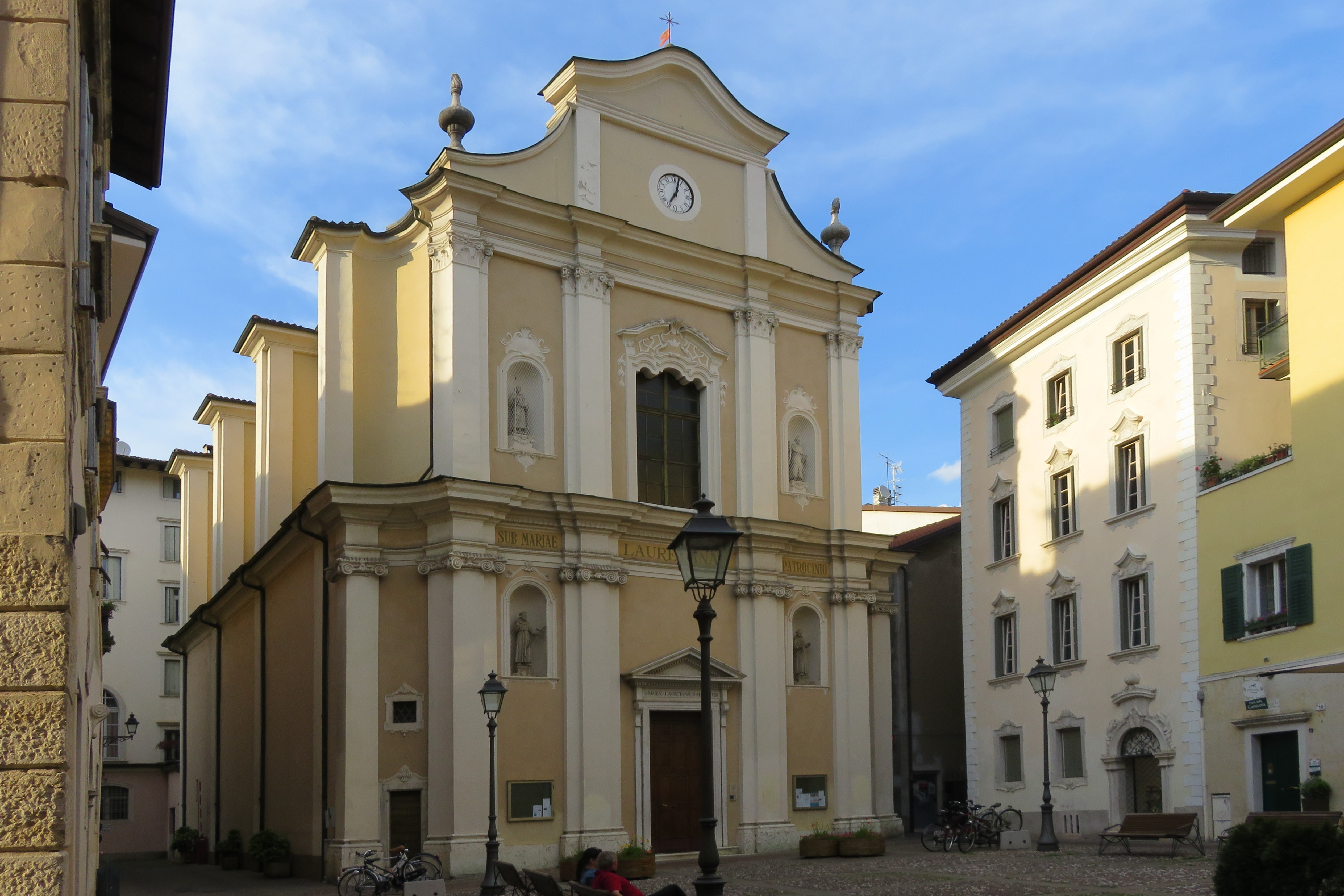 Chiesa di Loreto - Facciata e piazzetta